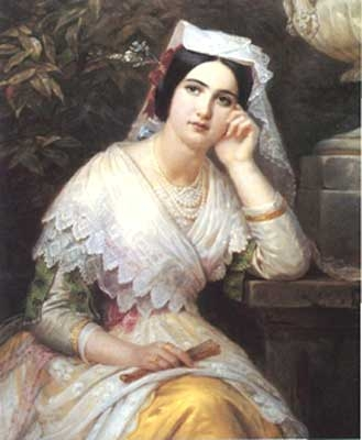 Портрет Виттории Кальдони-Лапченко